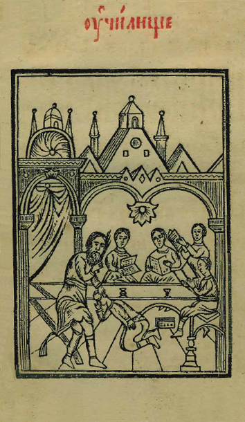 Василиий Бурцов. Азбука. Фронтиспис. 2-е издание 1637 год.